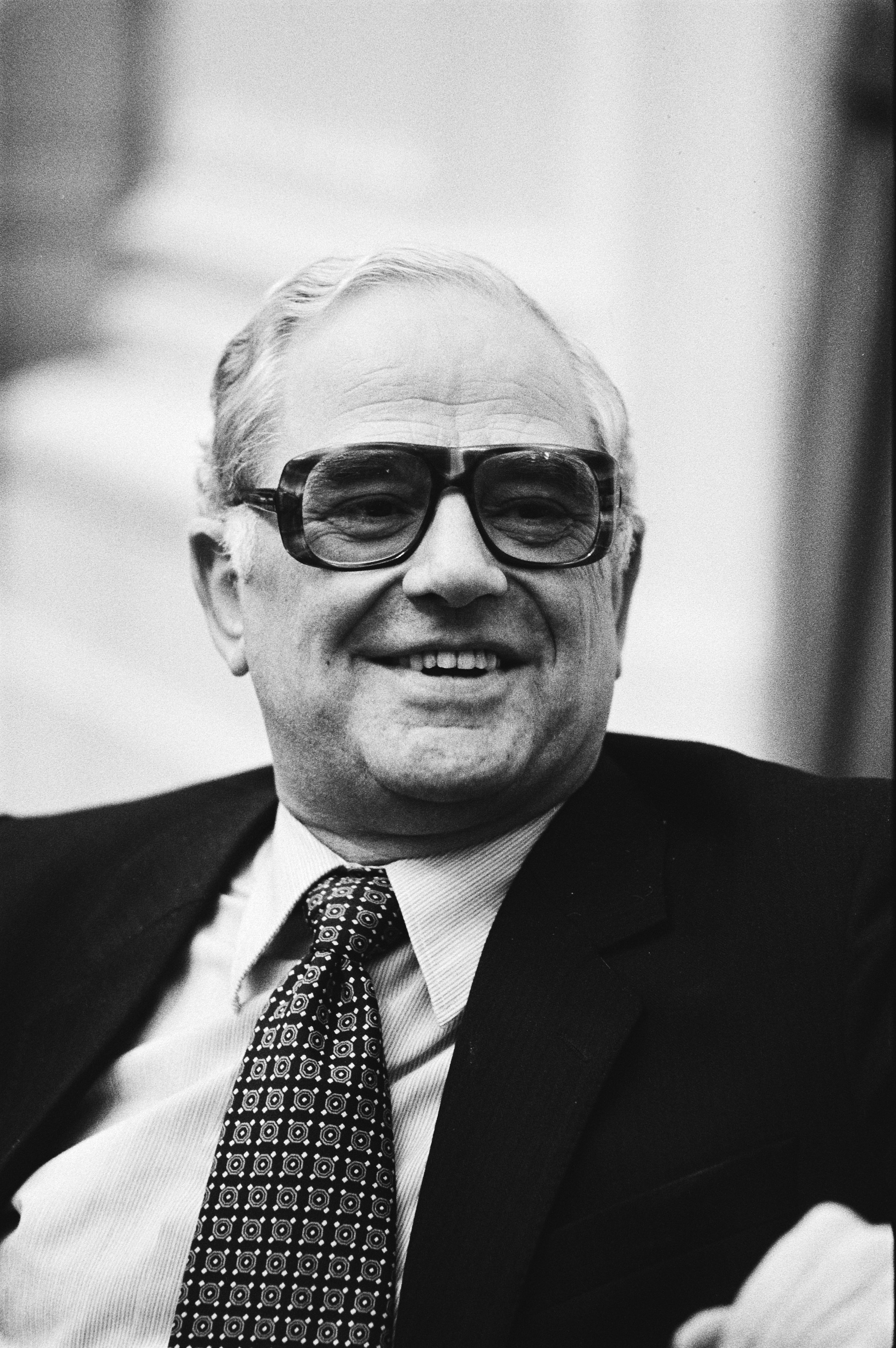 Collectie / Archief : Fotocollectie Anefo Reportage / Serie : Tweede Kamer behandelt begroting Buitenlandse Zaken Beschrijving : Minister Fons van der Stee, Minister van Landbouw en Visserij en minister voor Nederlands-Antilliaanse Zaken Datum : 13 november 1979 Locatie : Den Haag, Zuid-Holland Trefwoorden : ministers, overheidsbegrotingen, parlementaire debatten, portretten Persoonsnaam : Stee, Fons van der Fotograaf : Koen Suyk Auteursrechthebbende : Nationaal Archief Materiaalsoort : Negatief (zwart/wit) Nummer archiefinventaris : bekijk toegang 2.24.01.05 Bestanddeelnummer : 930-5386